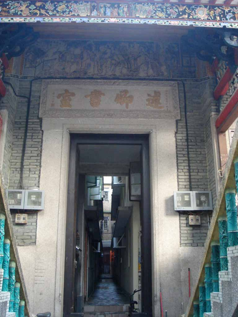 中文（香港）: 述卿書室古門樓。